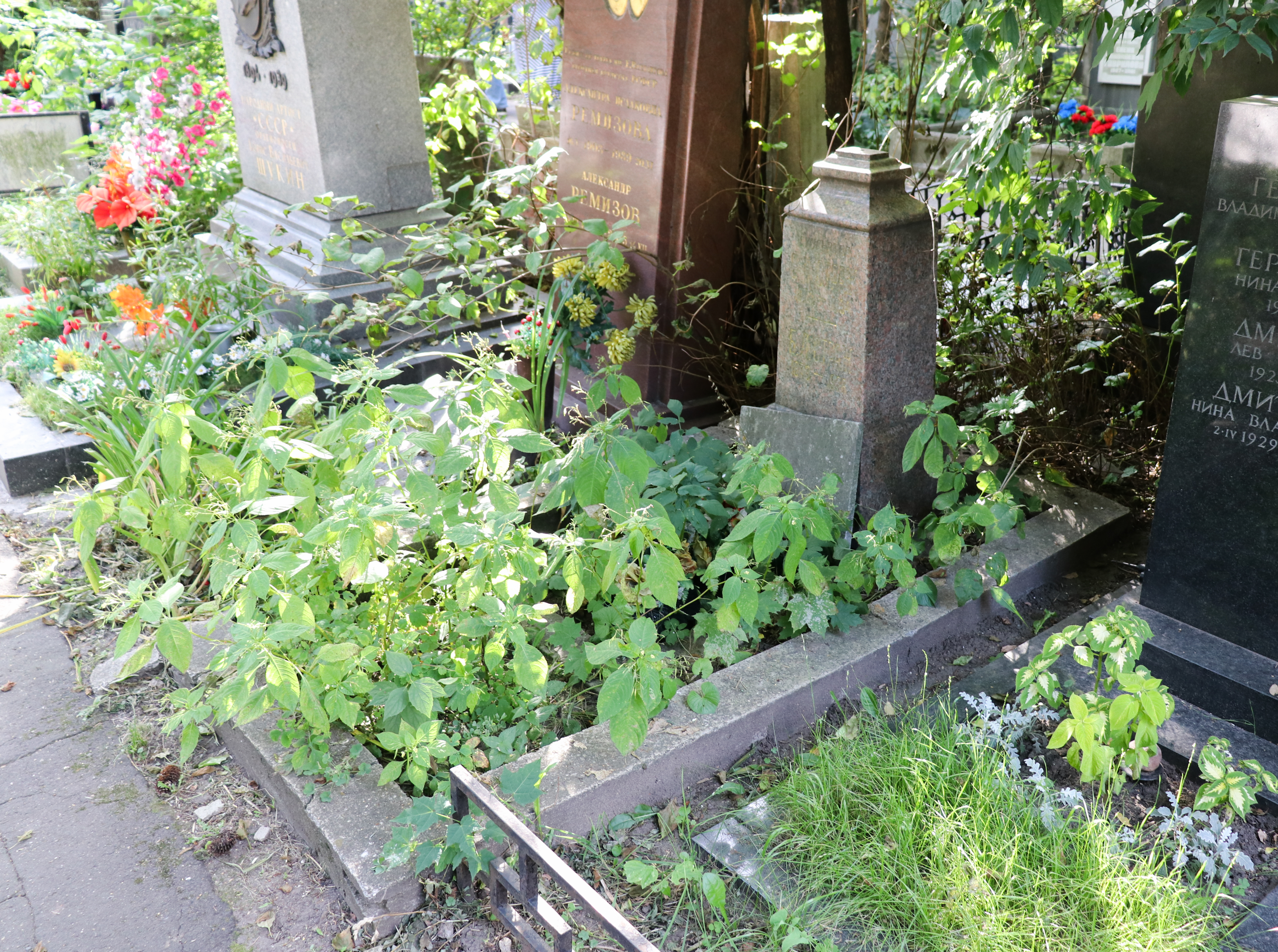 Могила Стража Соломона Наумовича, Берты Львовны Страж и Наумова-Стража Наума Соломоновича на Новодевичьем кладбище (2 участок, 10 ряд). Надписи: Скульптор С. Н. Страж 1878 - 1934 Б. Л. Страж 1873 - 1928 Наумов-Страж Н. С. 1898 - 1957